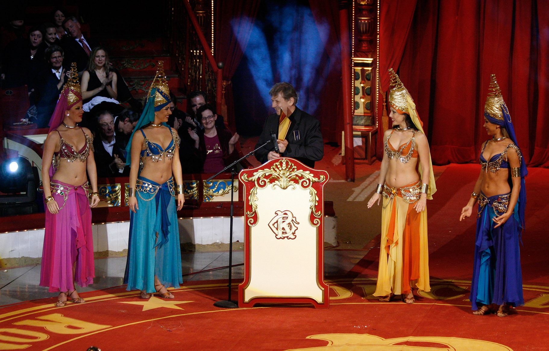 André Jung, ausgezeichnet als Bester Schauspieler, während der Verleihung des Nestroy-Theaterpreises 2009 (Circus Roncalli auf dem Wiener Rathausplatz).